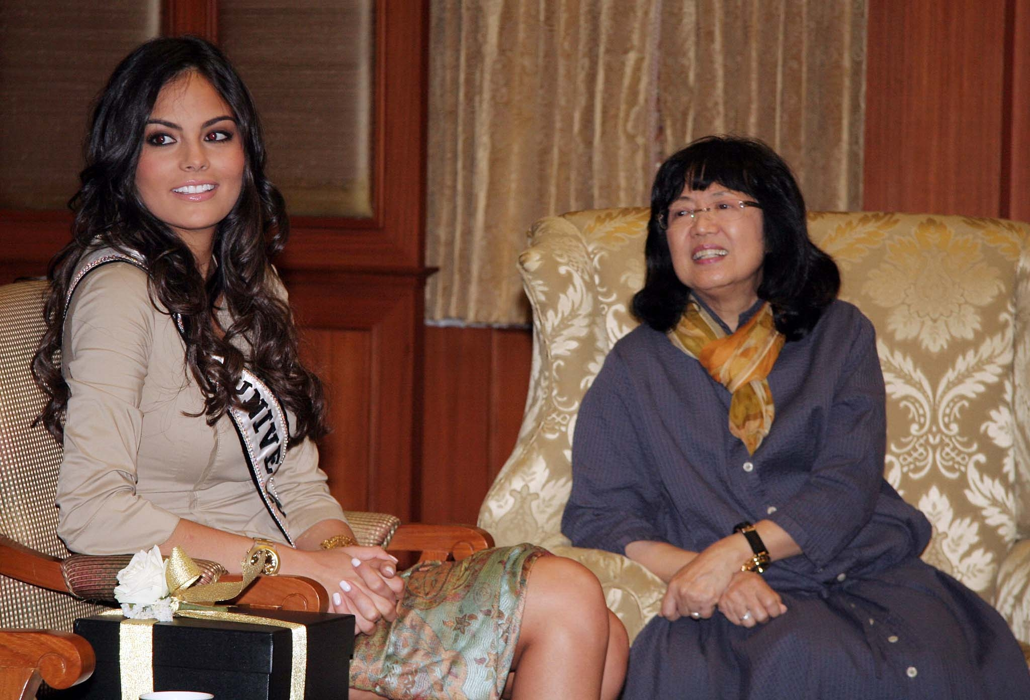 ฆิเมนา นาวาเรเต้ มิสยูนิเวิร์ส 2010 เข้าเยี่ยมคารวะนายกรัฐมนตรี ณ ห้องรับรอง 2 อาคารรัฐสภา 1 ถนนอู่ทองใน วันศุกร์ ที่ 25 มีนาคม พ.ศ.2554 (ภาพโดย The Nations)